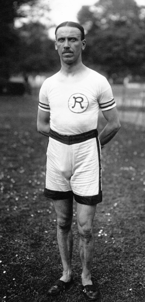 Les Jeux Olympiques : Malfait, en course : [photographie de presse] / Agence Meurisse